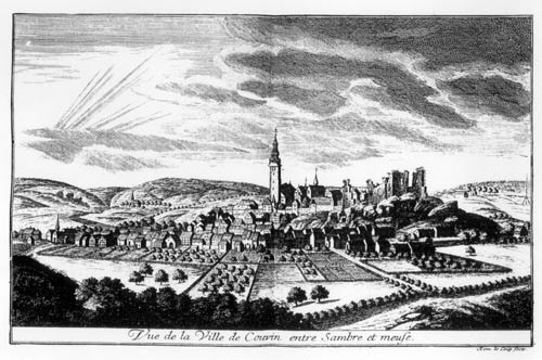 Gravure représentant une vue de la ville de Couvin vers 1735